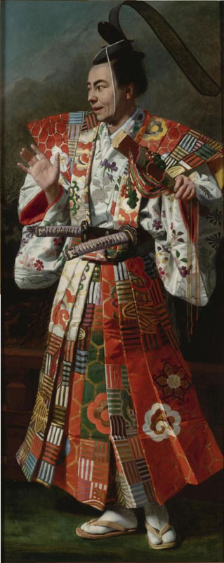 Portret samuraja